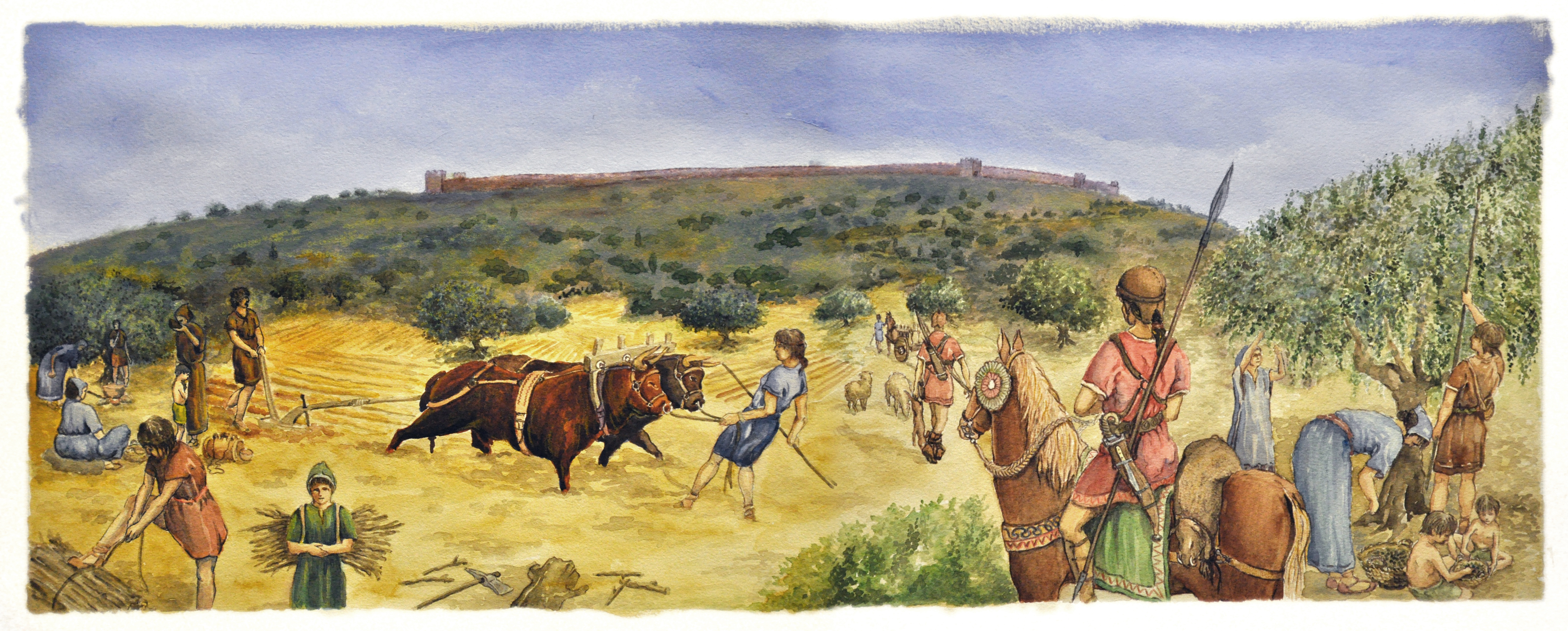 Escena de les activitats agrícoles realitzades als camps propers a la Bastida de les Alcusses. (F. Chiner).